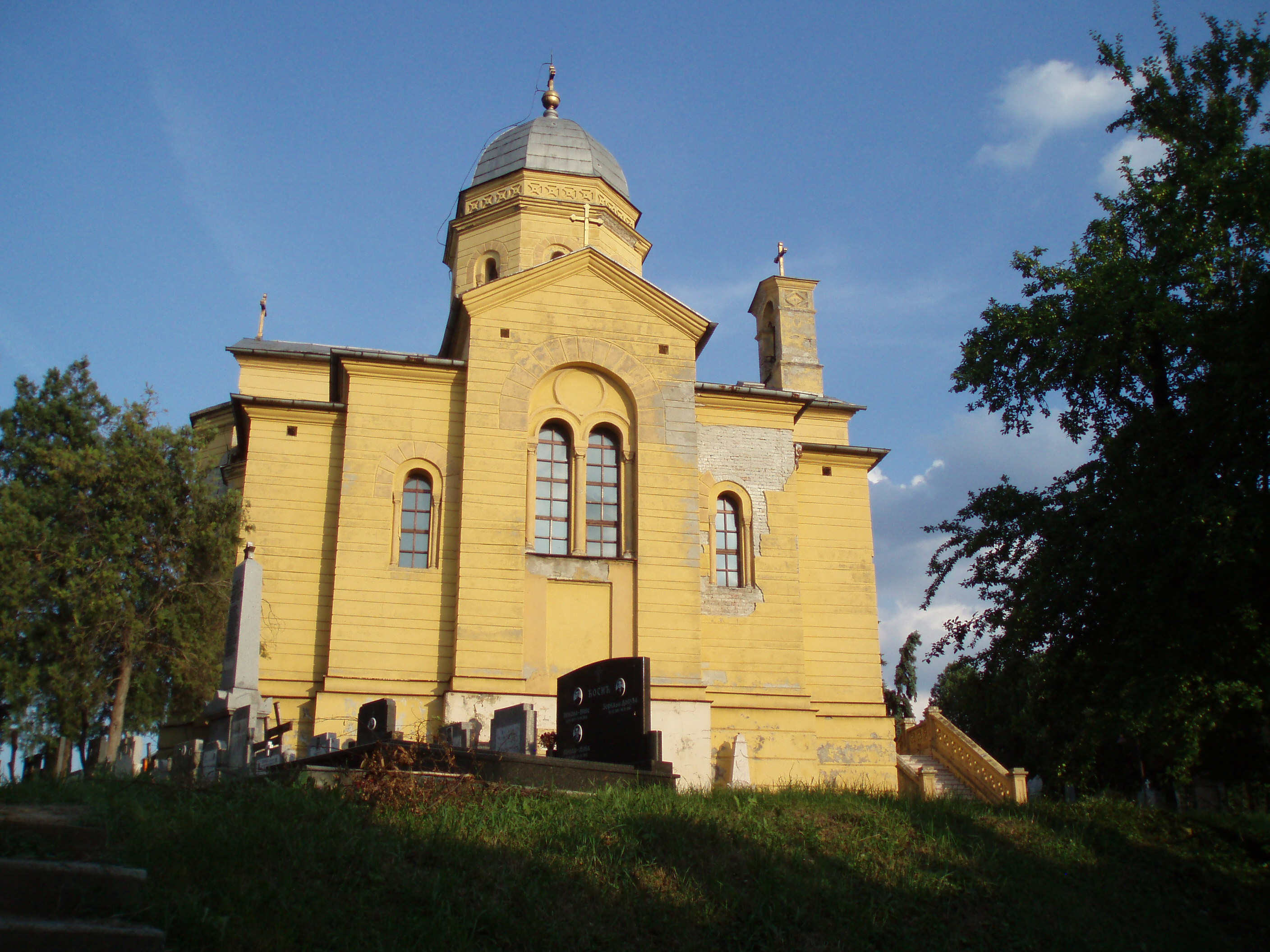 Црква светог Димитрија или познатија као Харишева капела у Земуну - Северна фасада, аутор:Nicolo